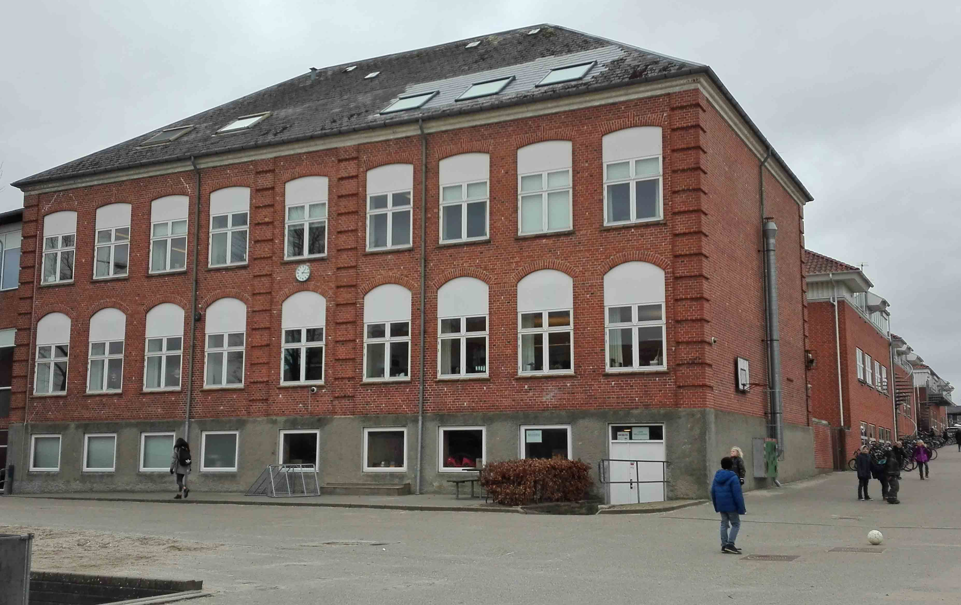 Aars skole fra M Madsens Vej